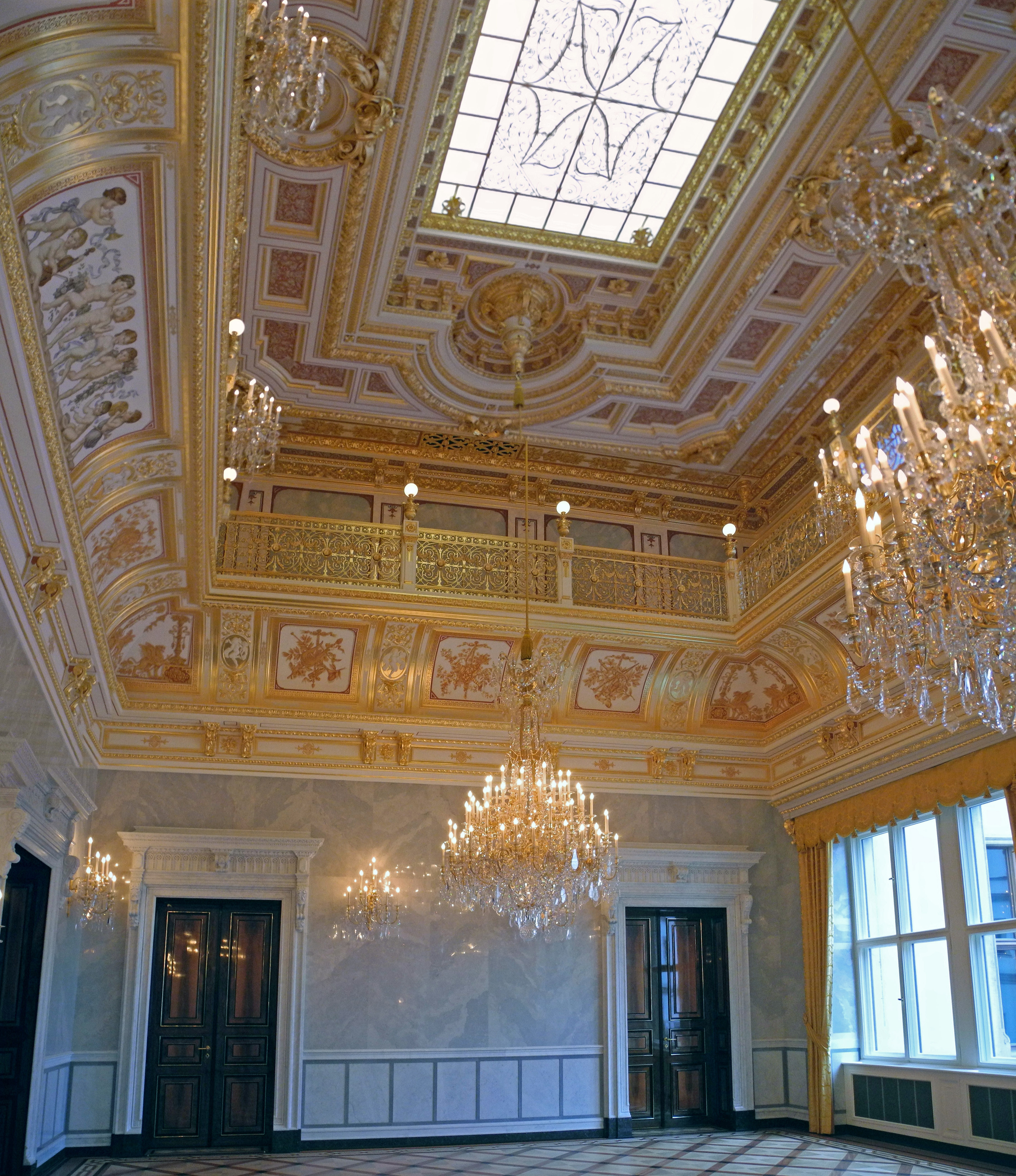 Residenzschloss Dresden – Georgenbau – Kleiner Ballsaal – Blick zur Nordwand